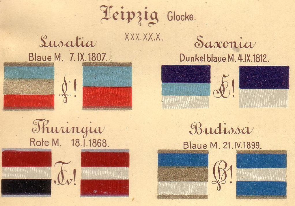 Couleur und Zirkel der Leipziger Corps